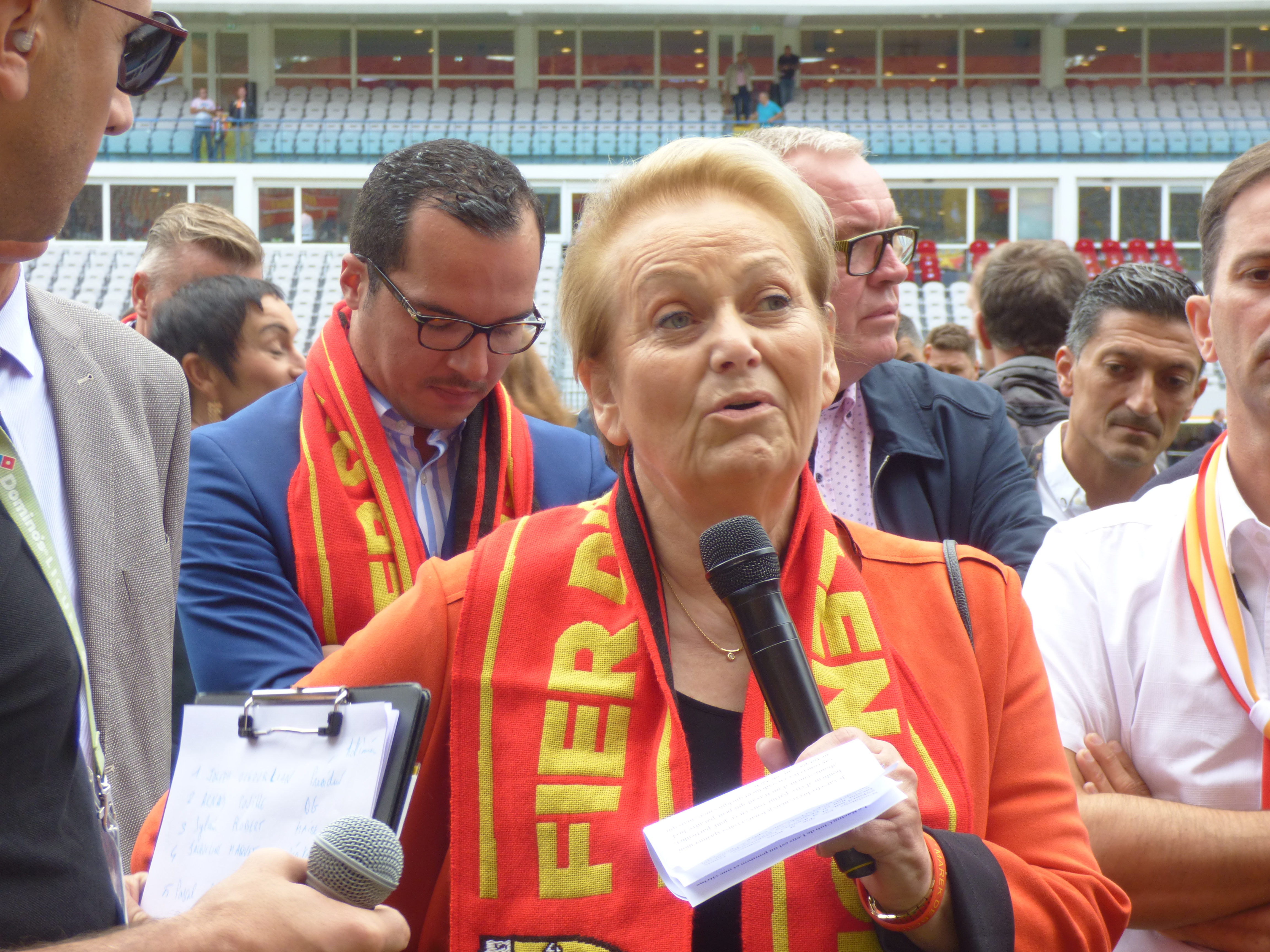 Jacqueline Maquet avant le match Lens / Sochaux, comptant pour la septième journée du championnat de France de football de Ligue 2, le 15 septembre 2018.